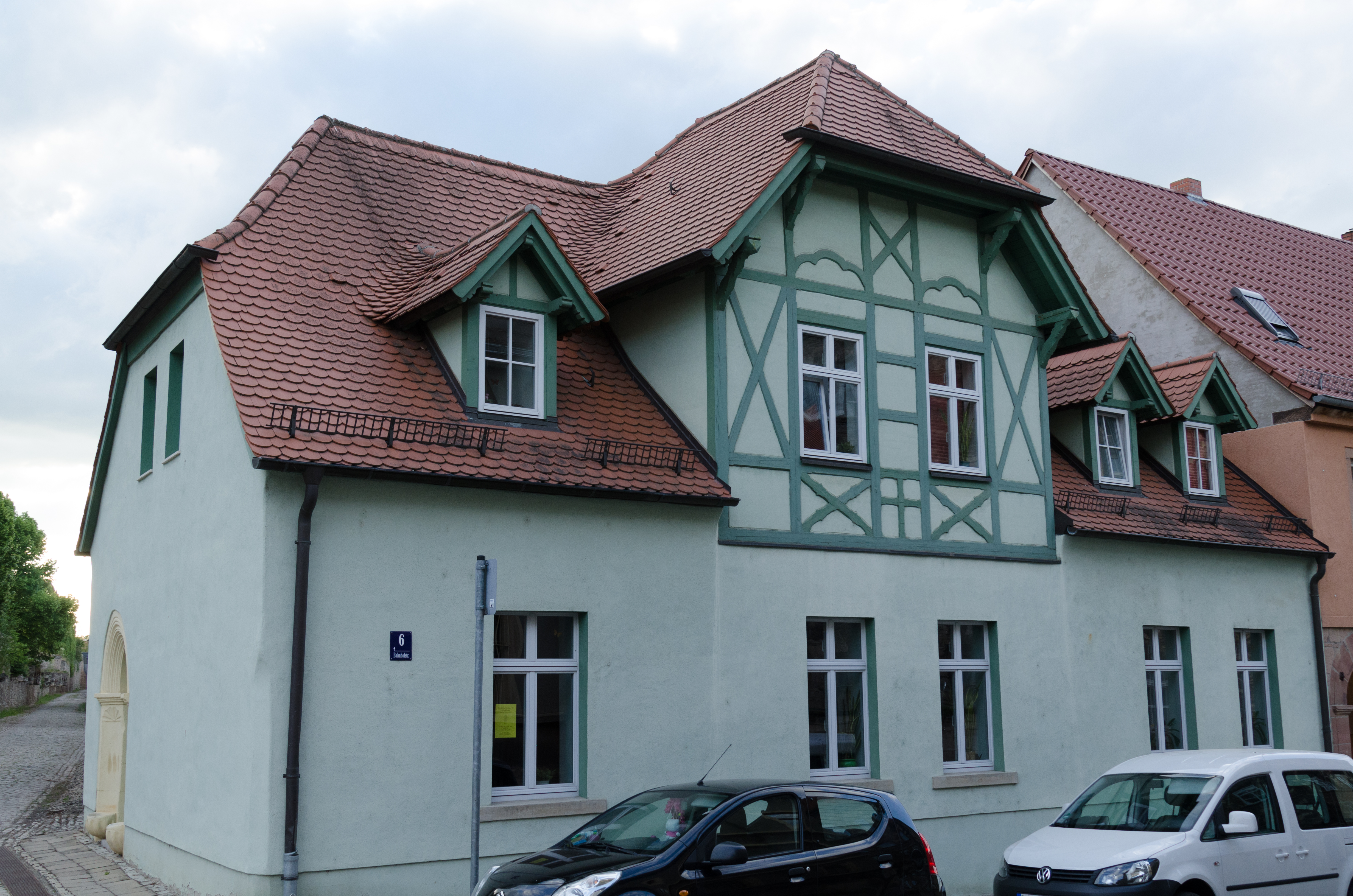 Laucha an der Unstrut, Bahnhofstraße 6